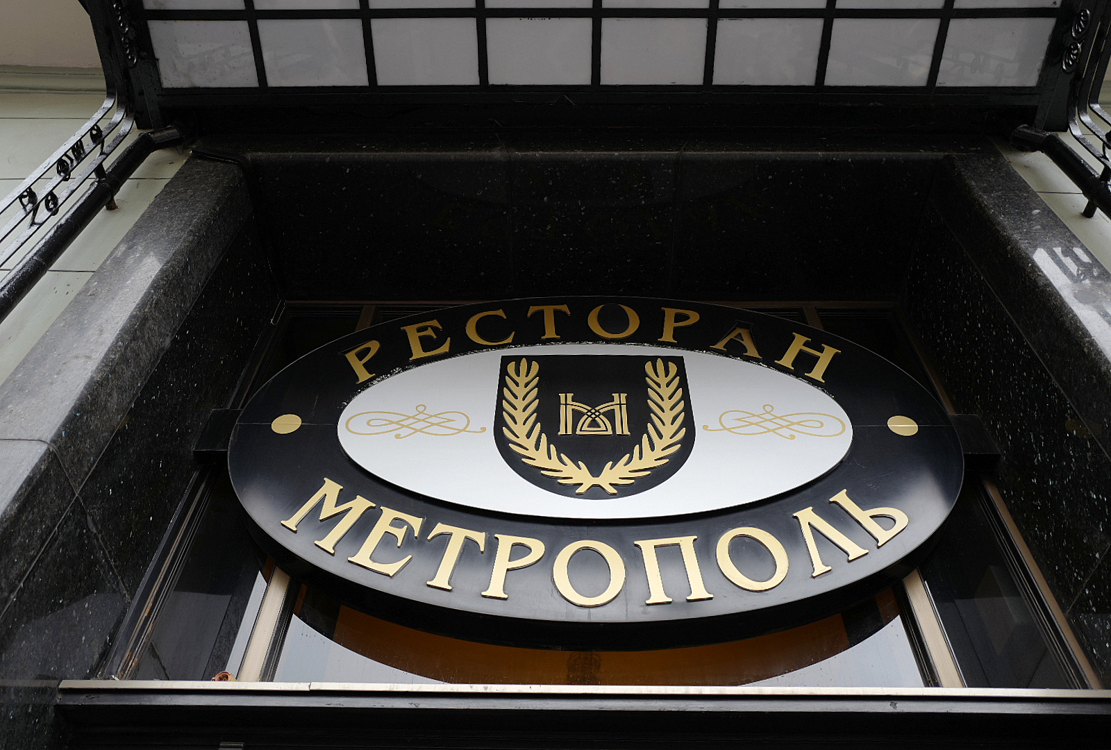 Современная вывеска над входом в ресторан со стороны улицы Театральный проезд